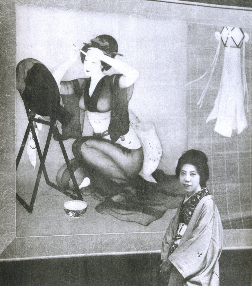 木谷千種と彼女の作品「眉の名残」